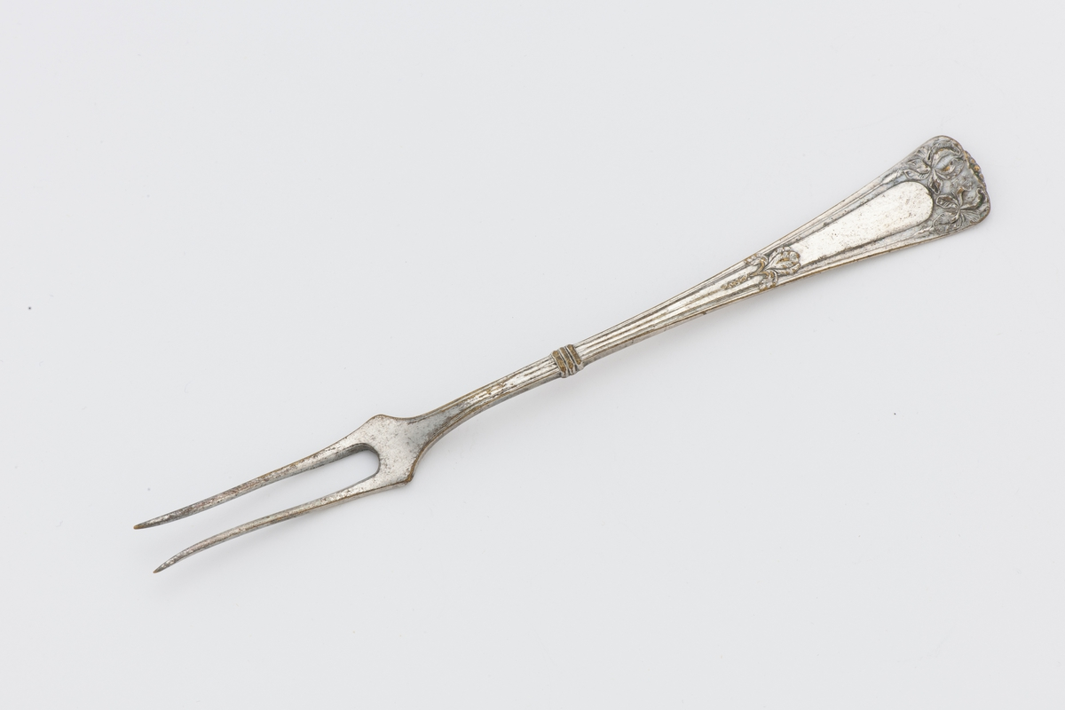 Kaldgaffel i sølv. Stemplet C.N.E. Foto: Berg, Roger / Kommandør Chr. Christensens Hvalfangstmuseum, SA 02208.